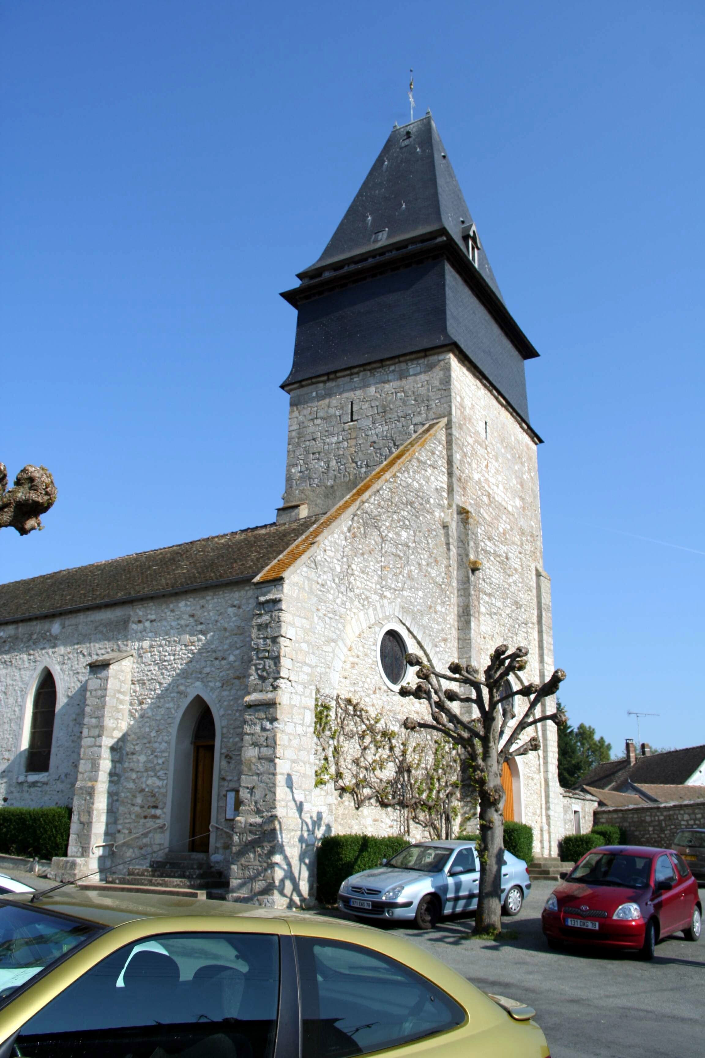 Église de Bréval - Yvelines (France)